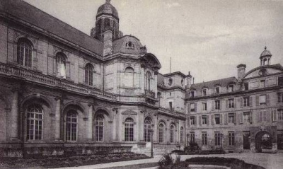 Cour d'honneur du séminaire des Eudistes de Caen